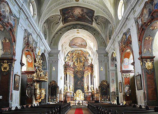 St. Veit (Krems an der Donau), Innenansicht